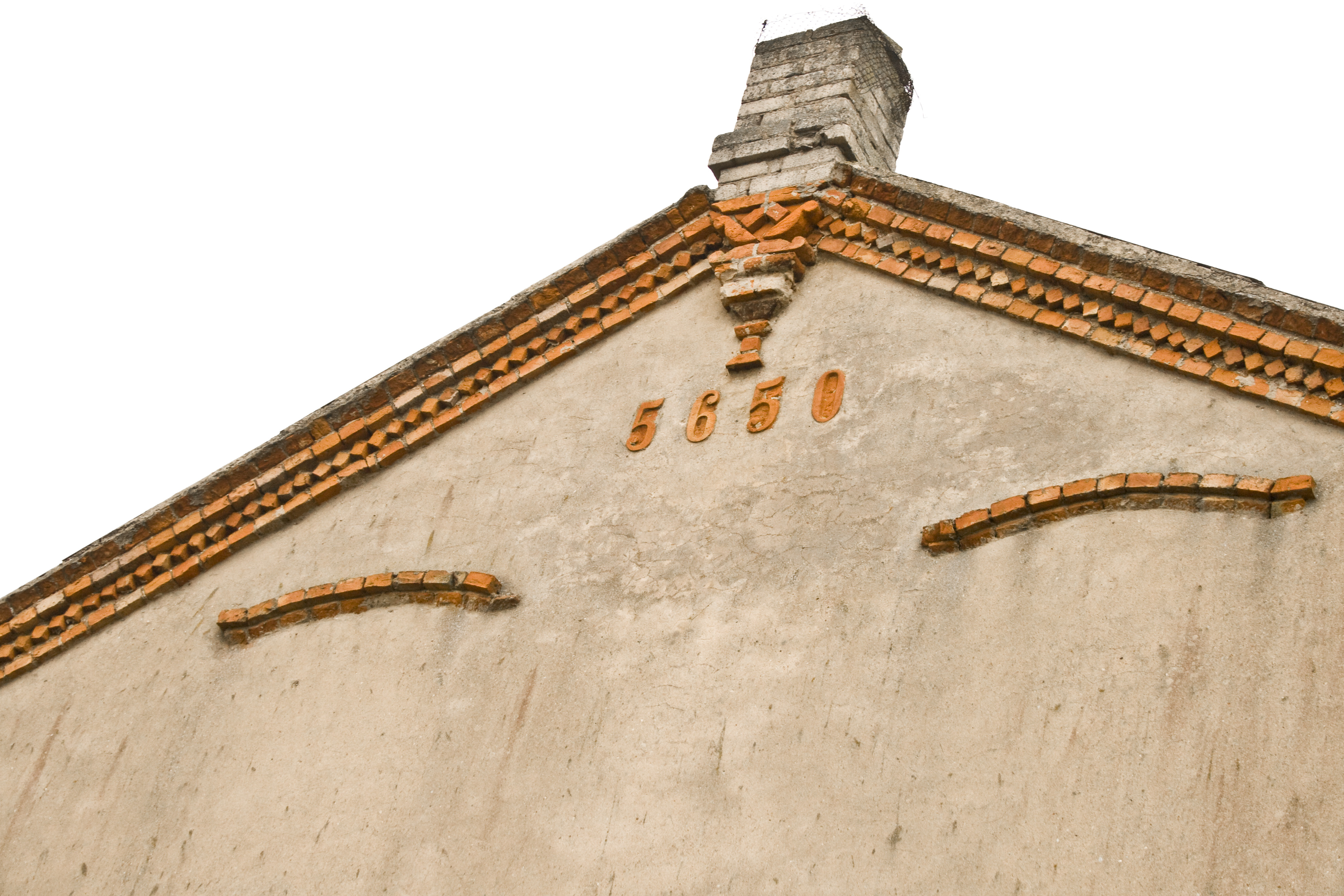 Linkuva synagogue anno 5650